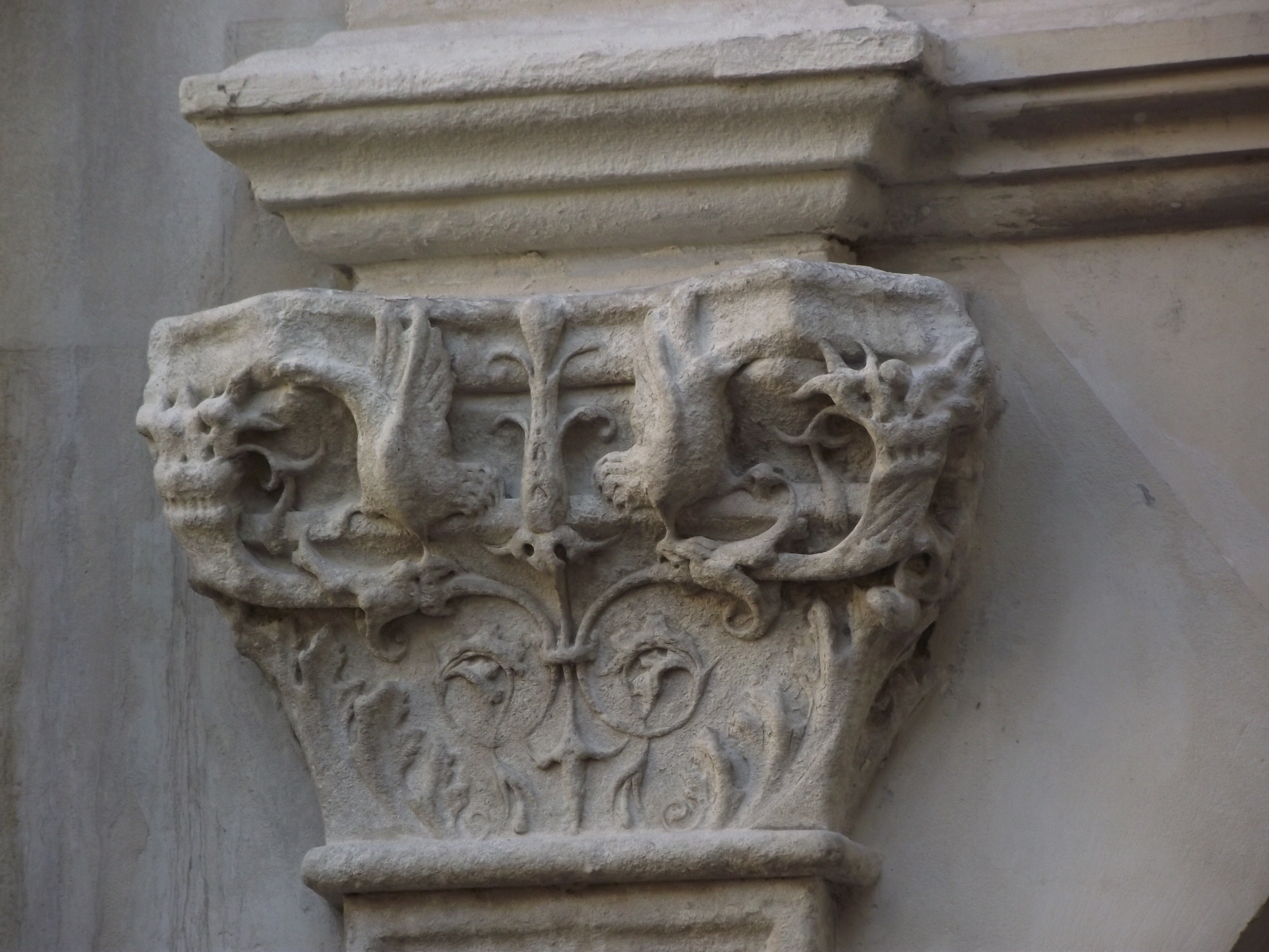 Cour de l'hôtel d'Alluye (détail)